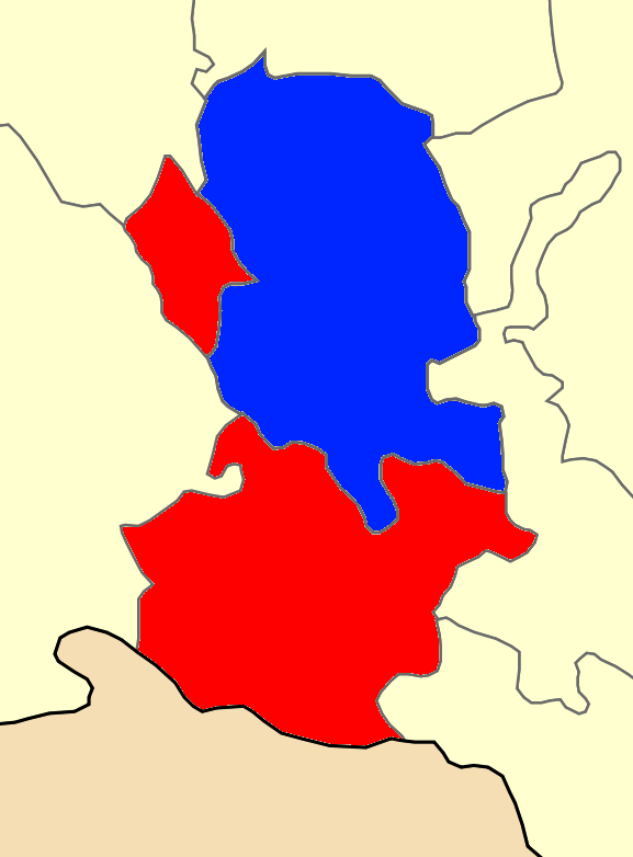 Χάρτης των ενοτήτων (και πρώην δήμων) από τις οποίες αποτελείται ο Δήμος Σκύδρας